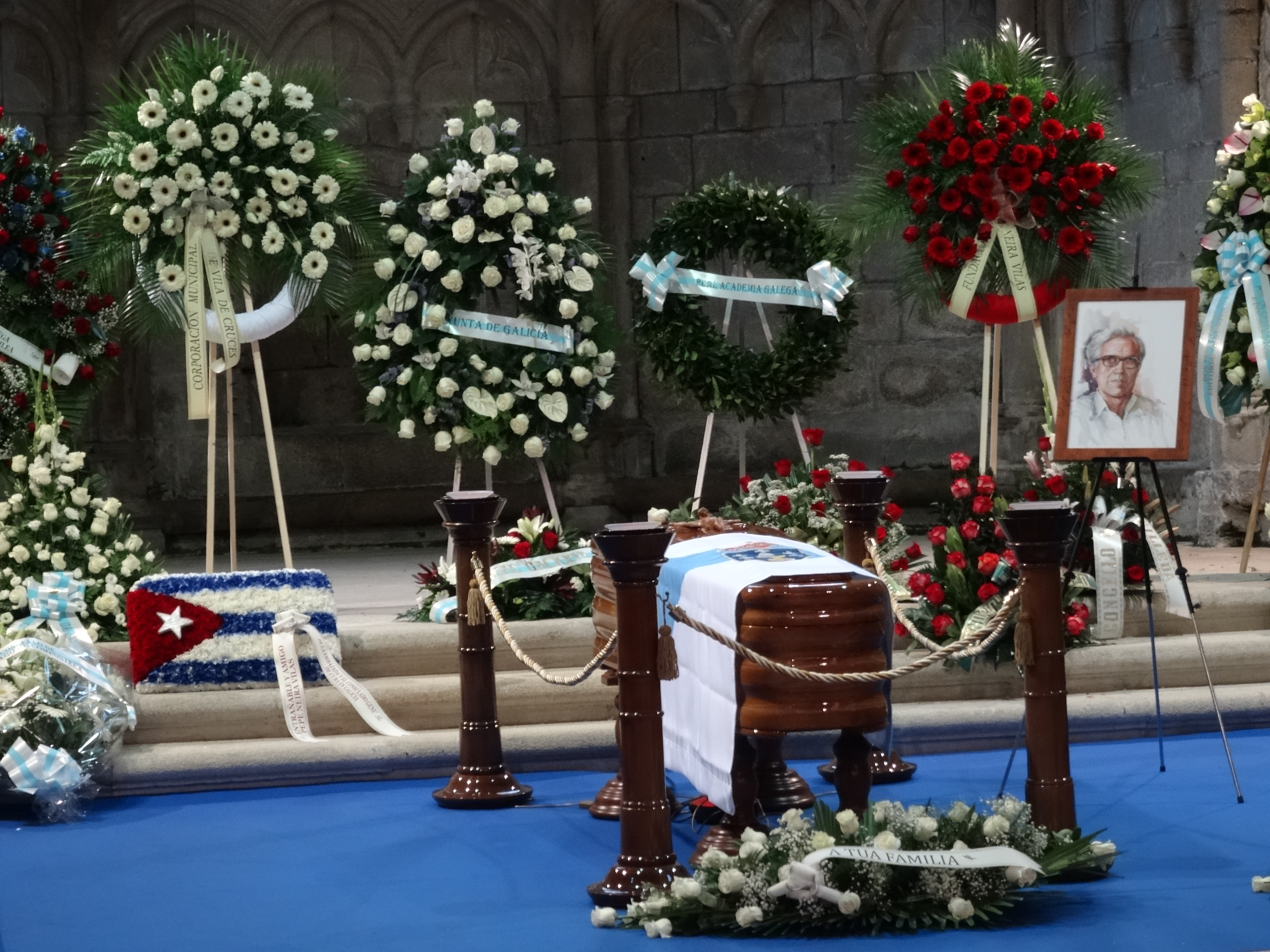 Despedida a Xosé Neira Vilas en San Domingos de Bonaval.